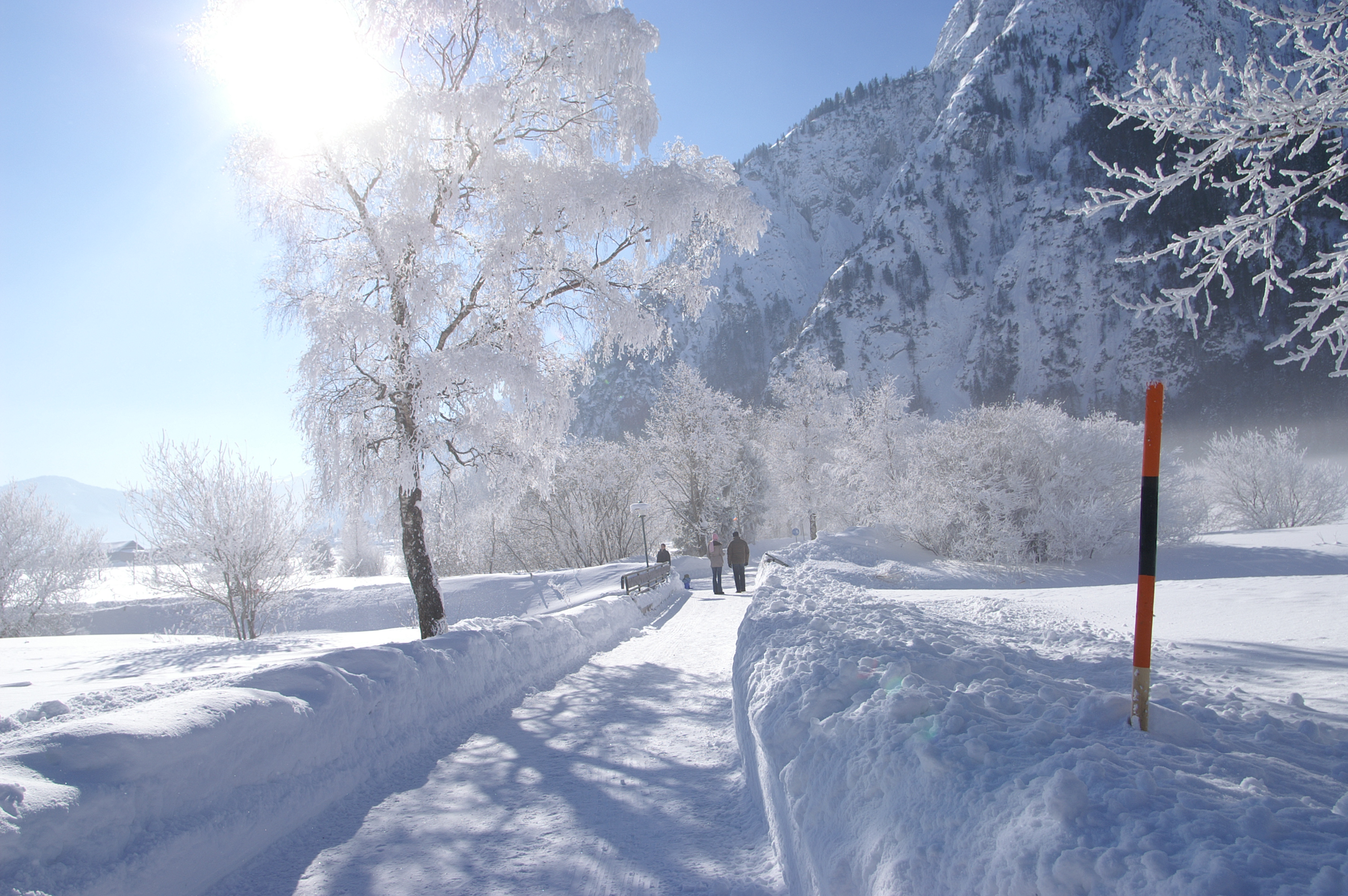 Winter am Achensee in Tirol.